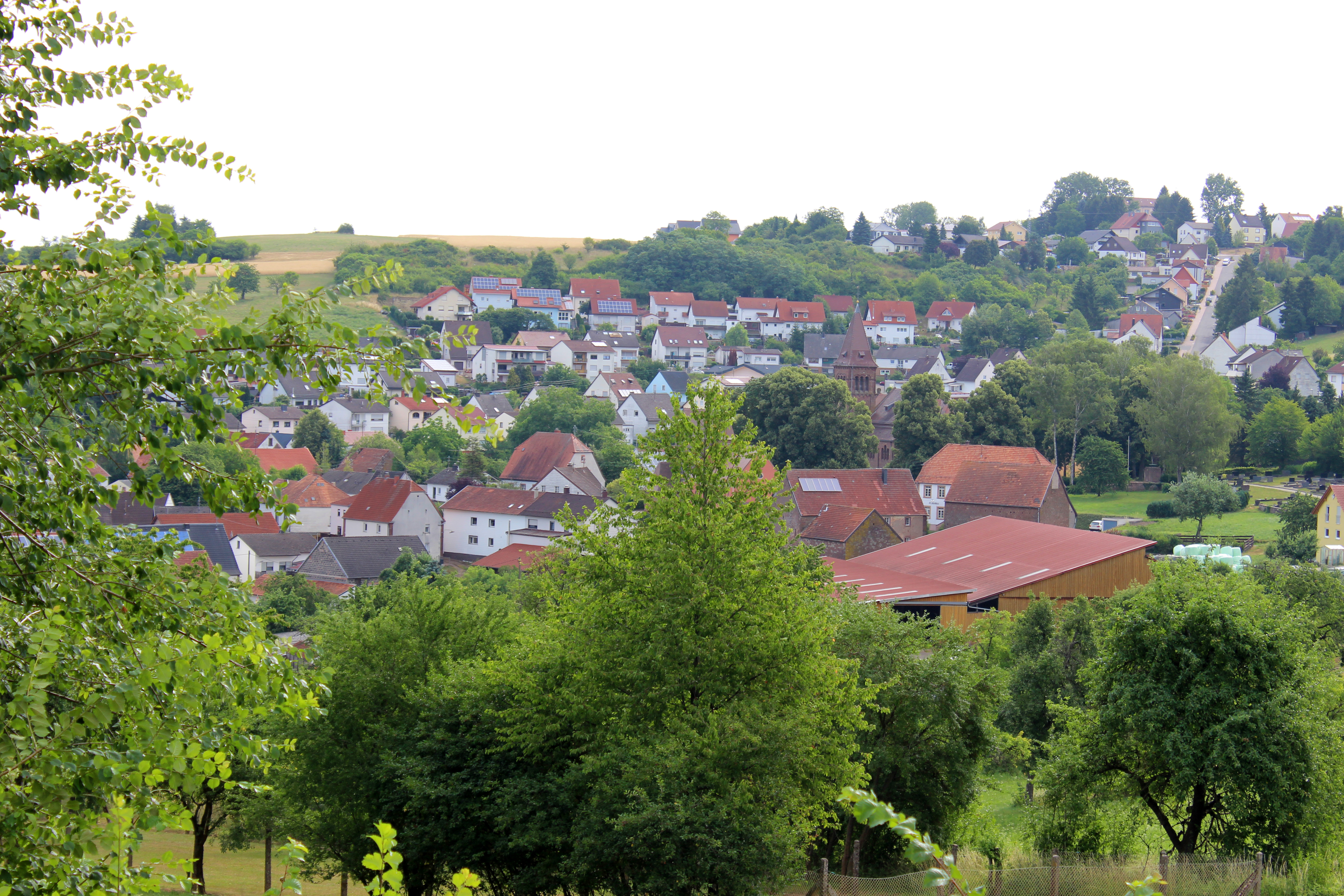 Ansicht von Nünschweiler, Kreis Südwestpfalz, Rheinland-Pfalz